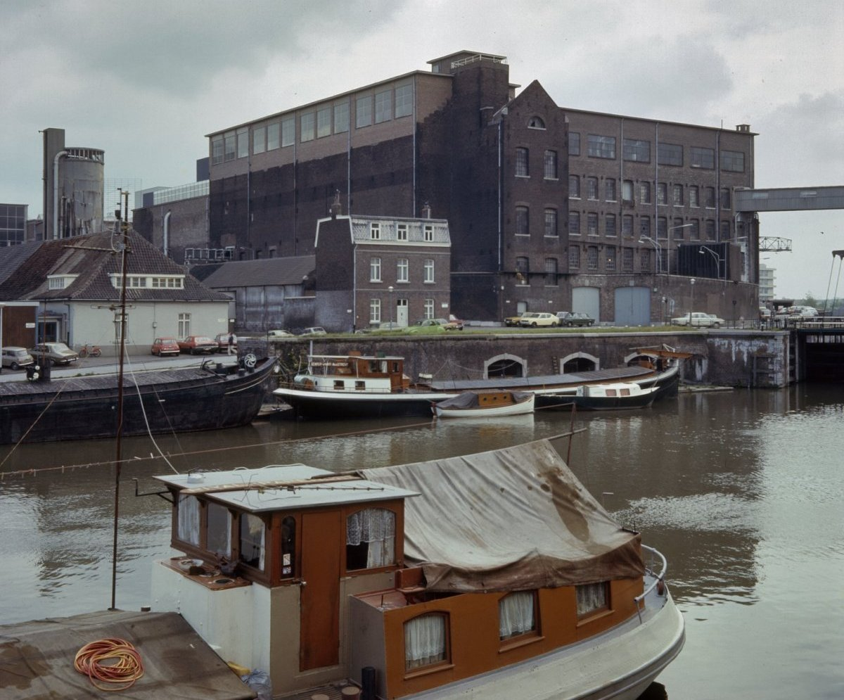 Papierfabriek Lhoest-Weustenraad & Cie: Overzicht over het fabriekscomplex gezien vanaf de overzijde van het Bassin